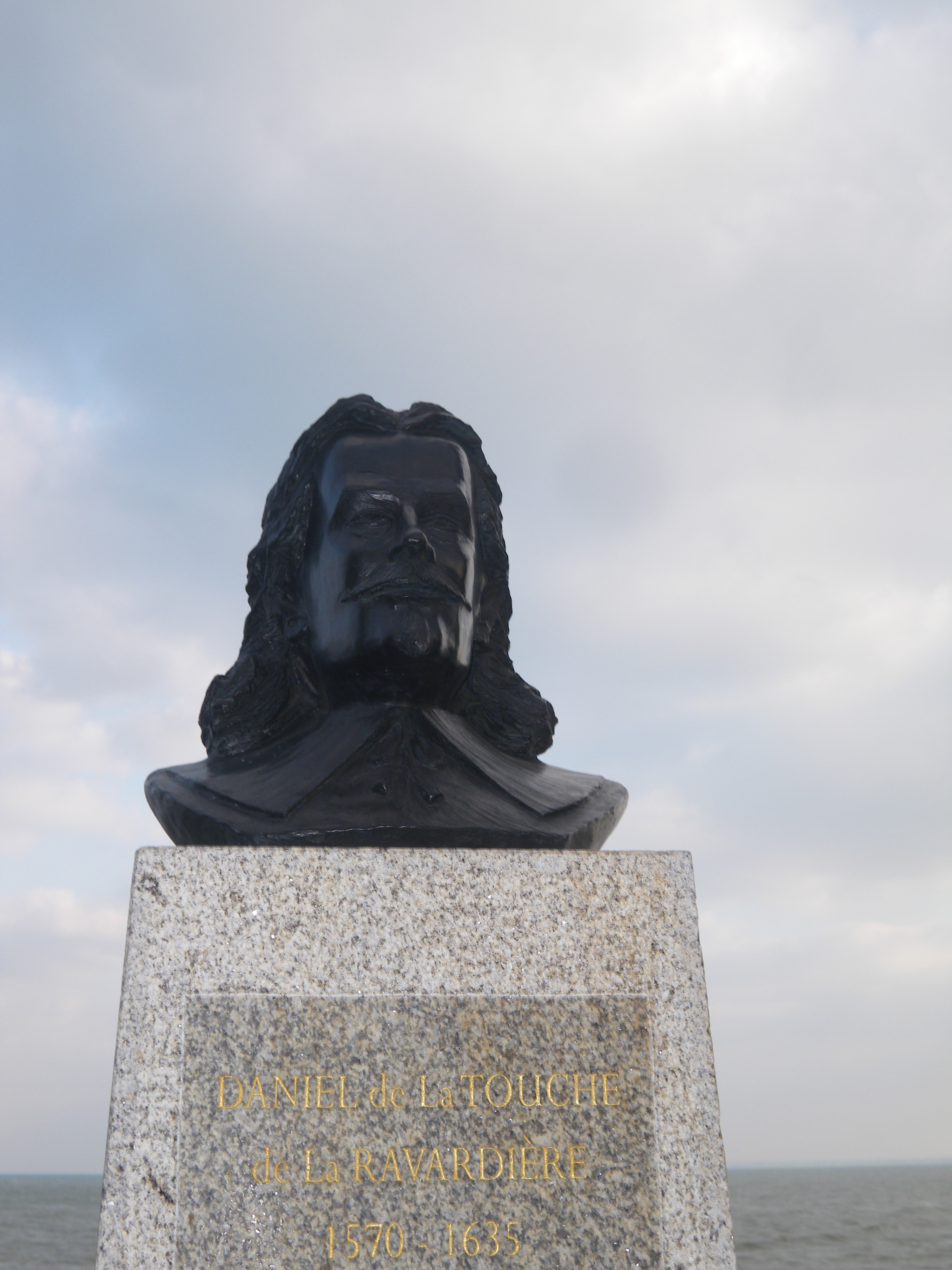 statue a cancale